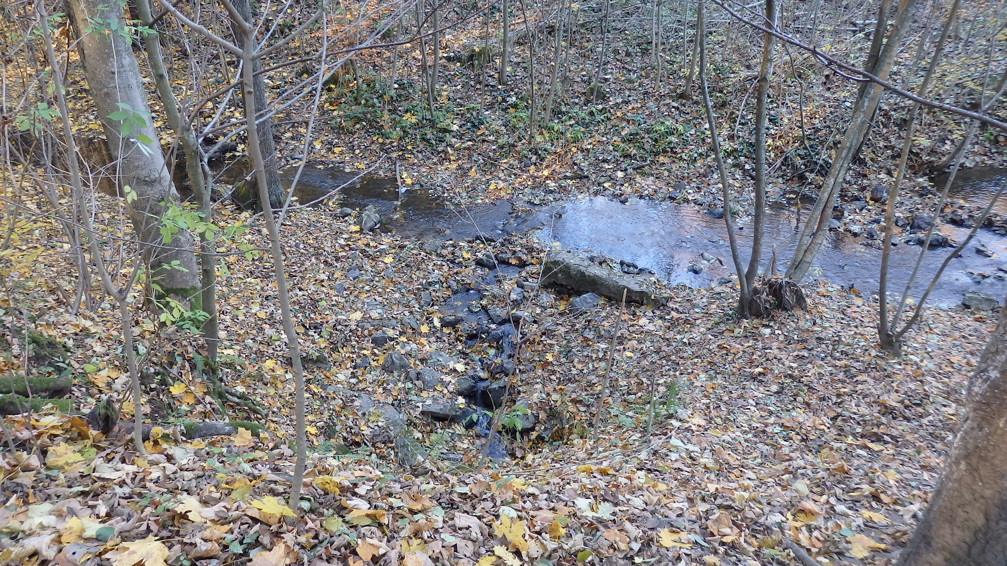 Naučná stezka Hády a údolí Říčky, okres Brno-venkov, estavela